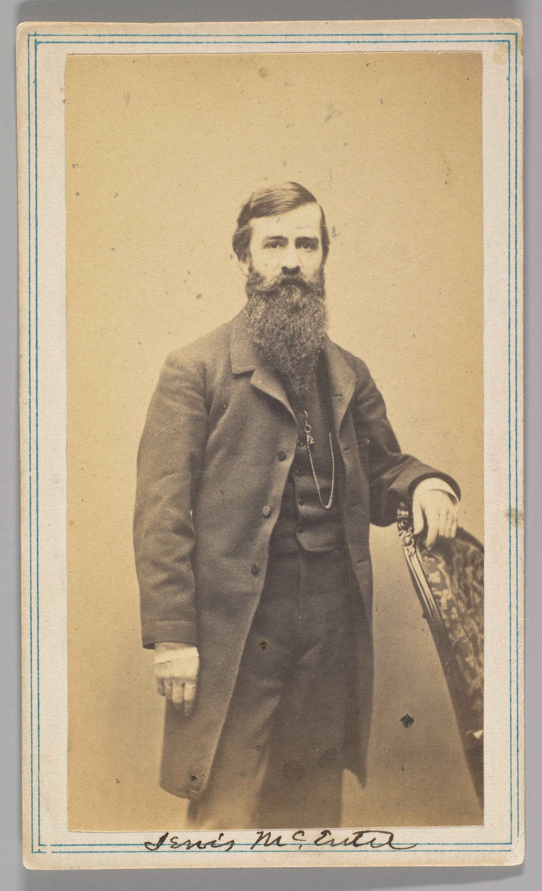 Carte-de-visite; Photographs